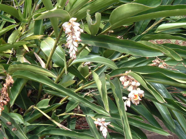 Alpinia zerumbet